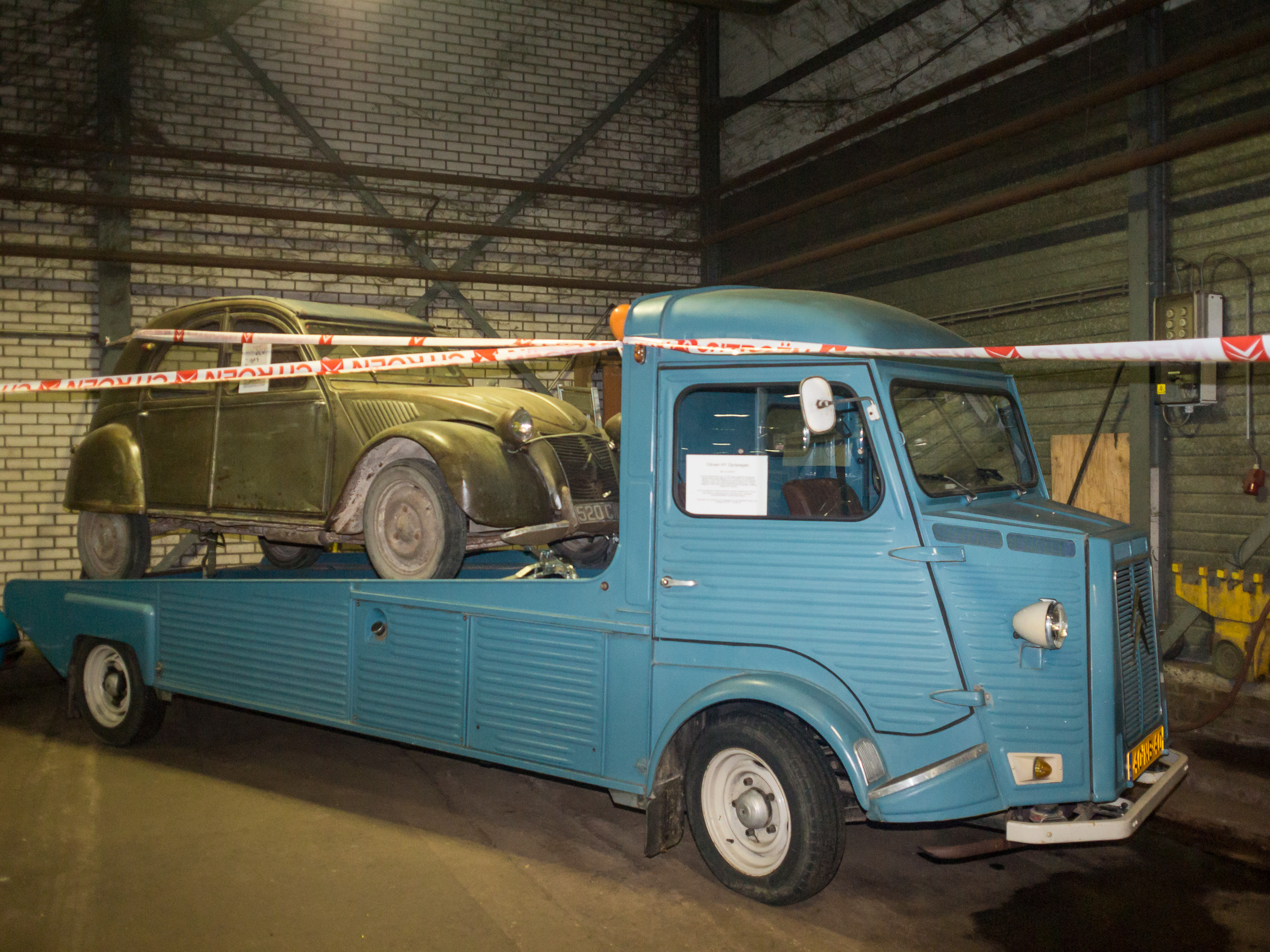 Oldtimer show Eelde 2013 - Citroën HY Transporter